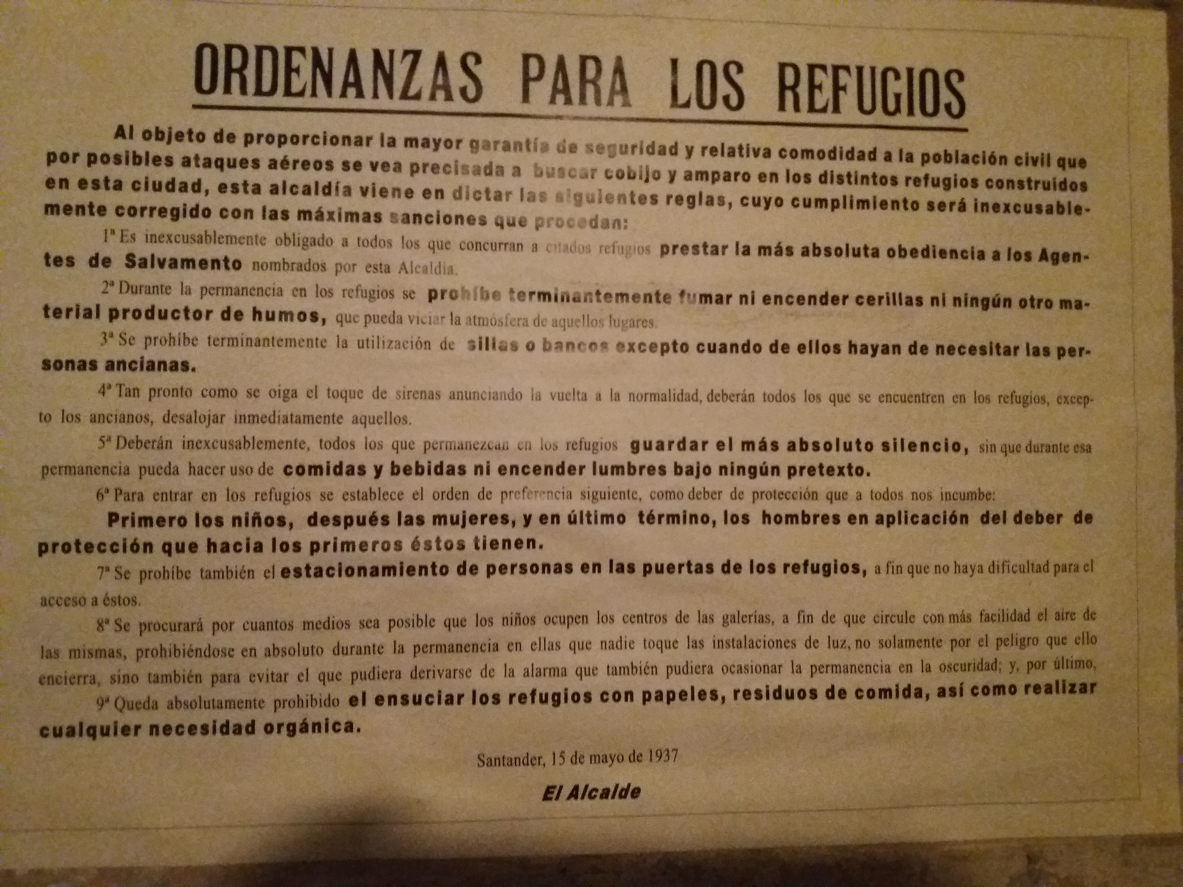 Bajo la plaza de Mariana de Pineda (hoy Plaza del Príncipe), los santanderinos construyeron en la primavera de 1937 un refugio para protegerse de los bombardeos de la aviación.